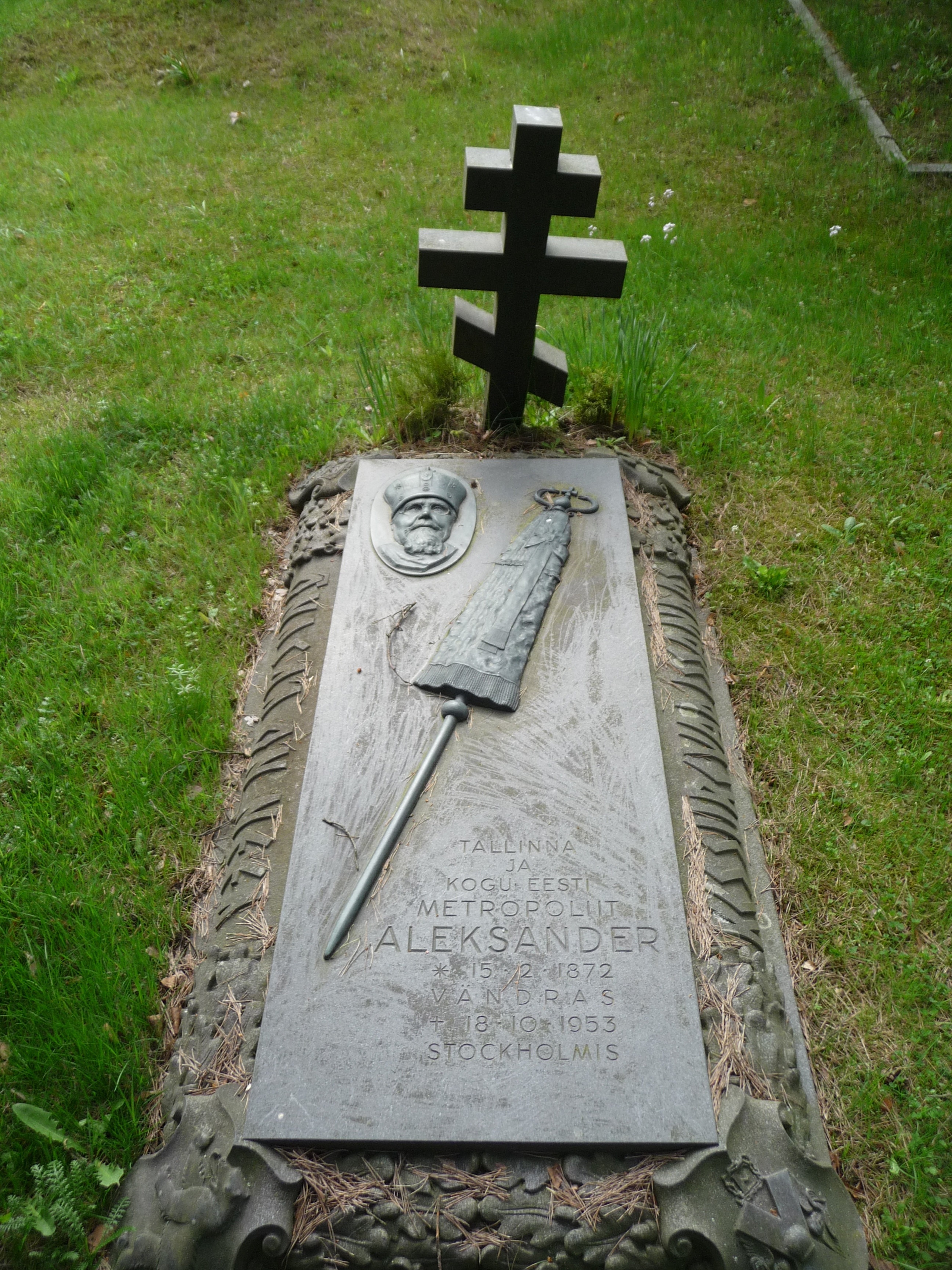 ”Tallinna ja kogu Eesti Metropoliit Aleksander” Biskopen Aleksander i estnisk-ortodoxa kyrkan, begravd på Skogskyrkogården i Stockholm